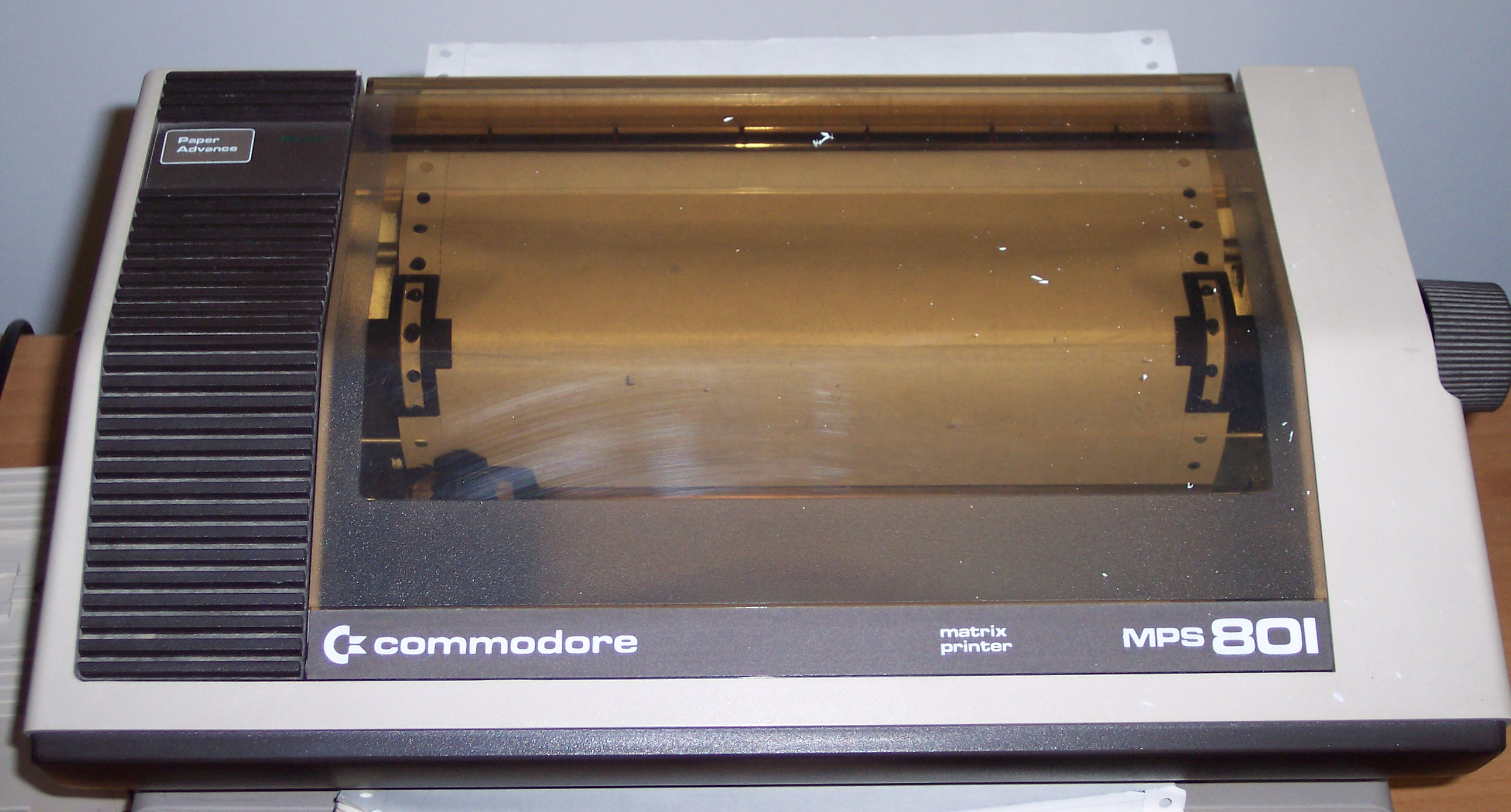 Una stampante MPS-801 per Commodore 64. Si ringrazia l'associazione Verdebinario per la disponibilità